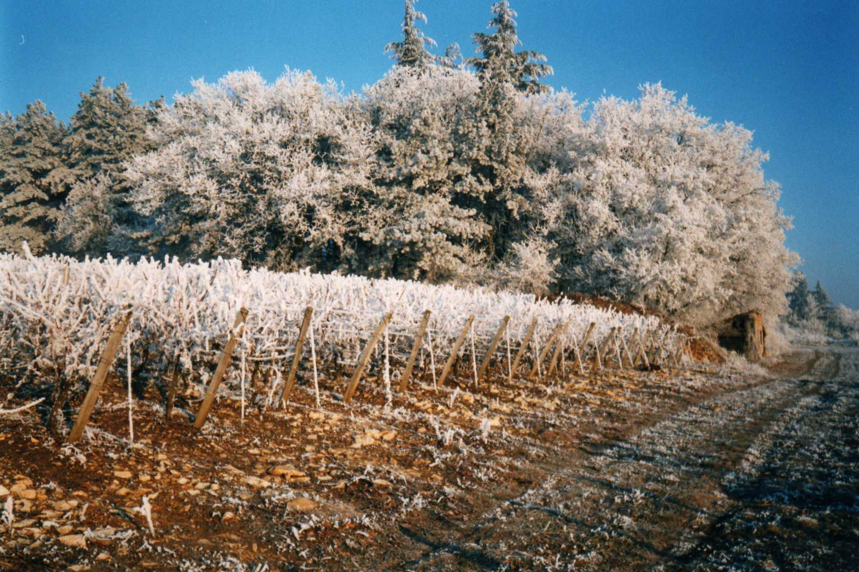 vignes en hiver ( givre )